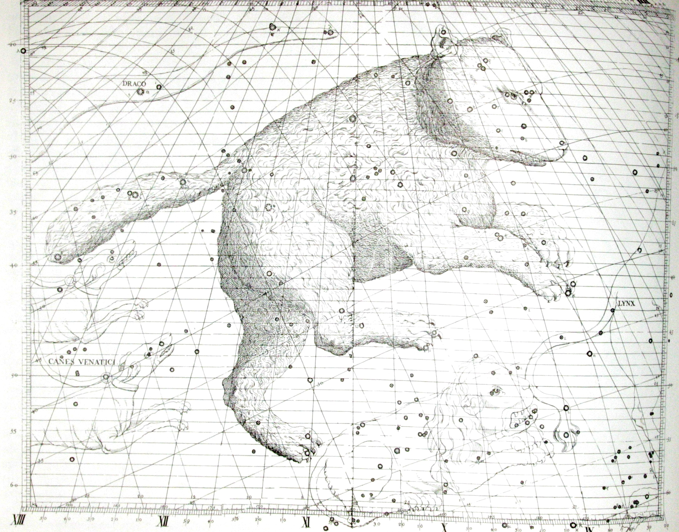 מפת קבוצת הדובה הגדולה